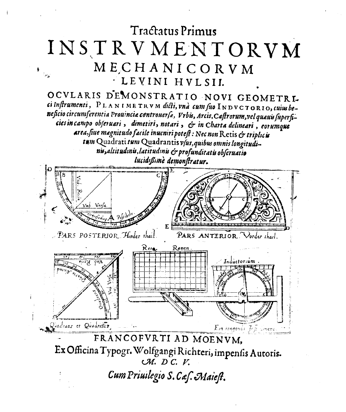 1: Ocularis demonstratio noui geometrici instrumenti, planimetrum dicti, vna cum suo inductorio, cuius beneficio circumferentia prouinciae controuersae, vrbis, arcis, castrorum, vel quaeuis superficies in campo obseruari, ... & in charta delineari, eorumque area, siue magnitudo facile inueniri potest: nec non Retis & triplicis tum quadrati tum quadrantis vsus, quibus omnis longitudinis, altitudinis, latitudinis & profunditatis obseruatio lucidissime demonstratur. - Francofurti ad Moenum : ex officina typogr. Wolfgangi Richteri, impensis authoris, 1605. - [8], 121, [3] p., [21] c. di tav. ripiegate, [2] c. di tav. doppie : ill., tabelle .